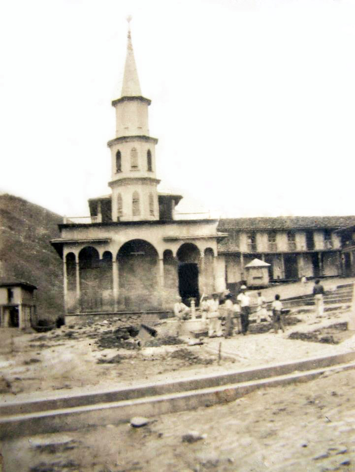 Primera iglesia de Piñas